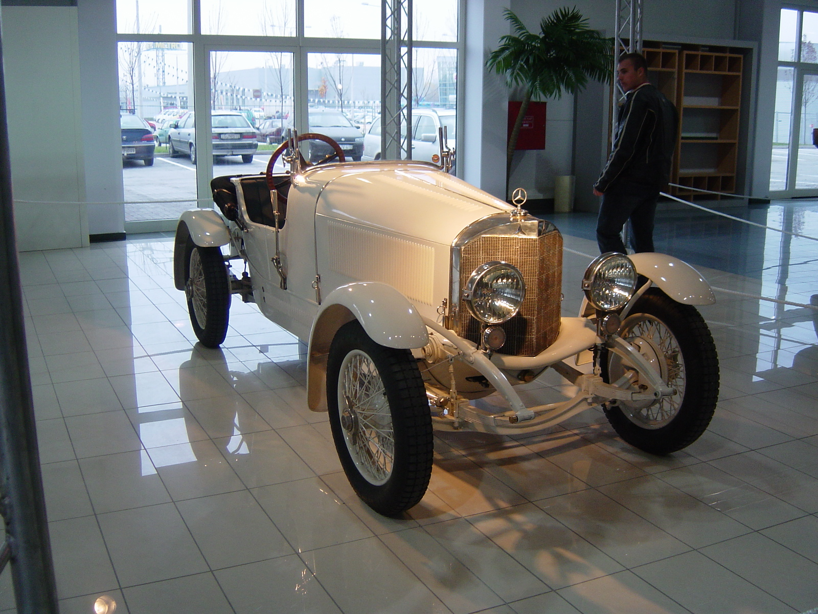 Mercedes